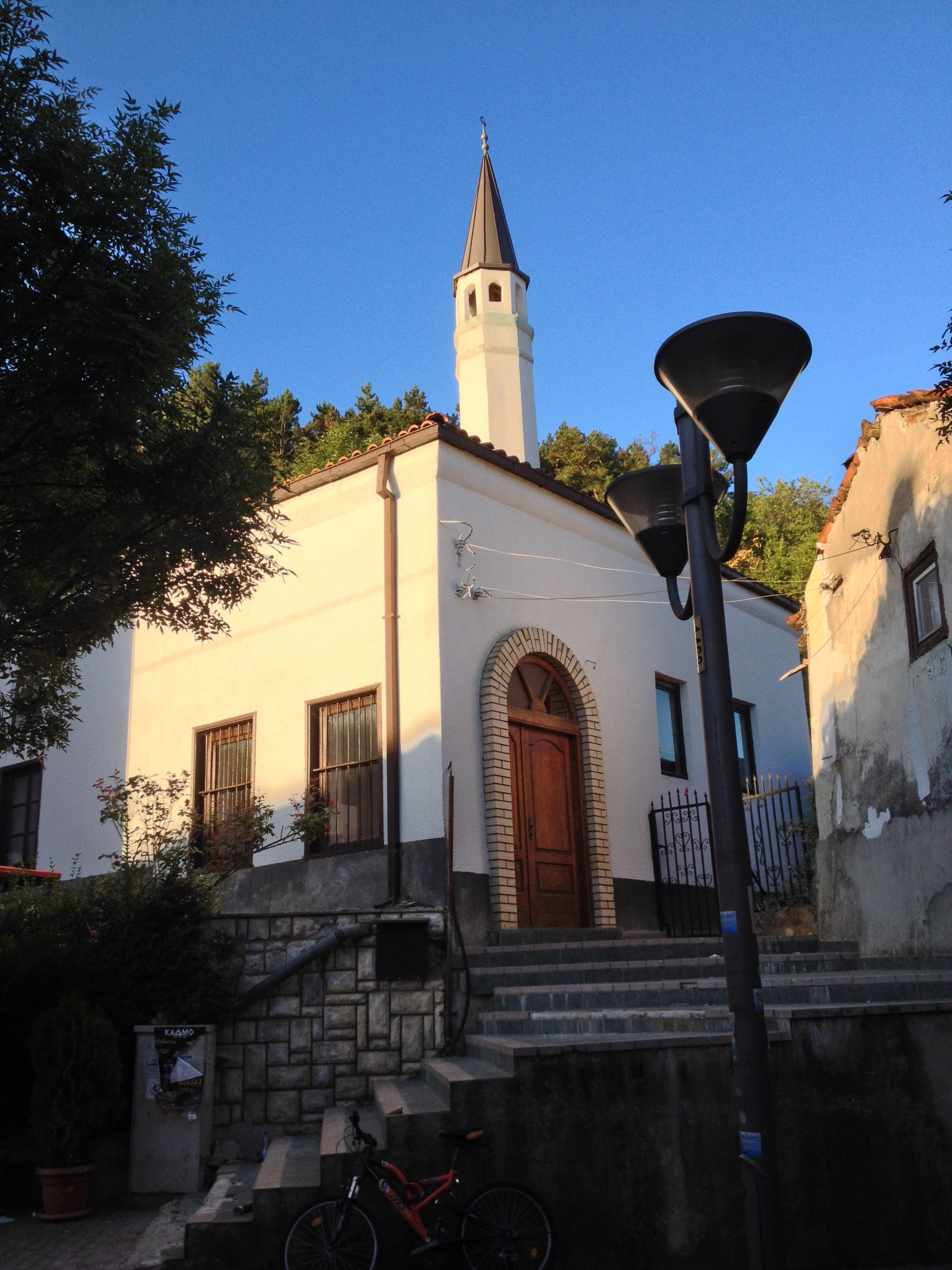 Die Hadschi-Hamzah-Moschee in Ohrid, Mazedonien